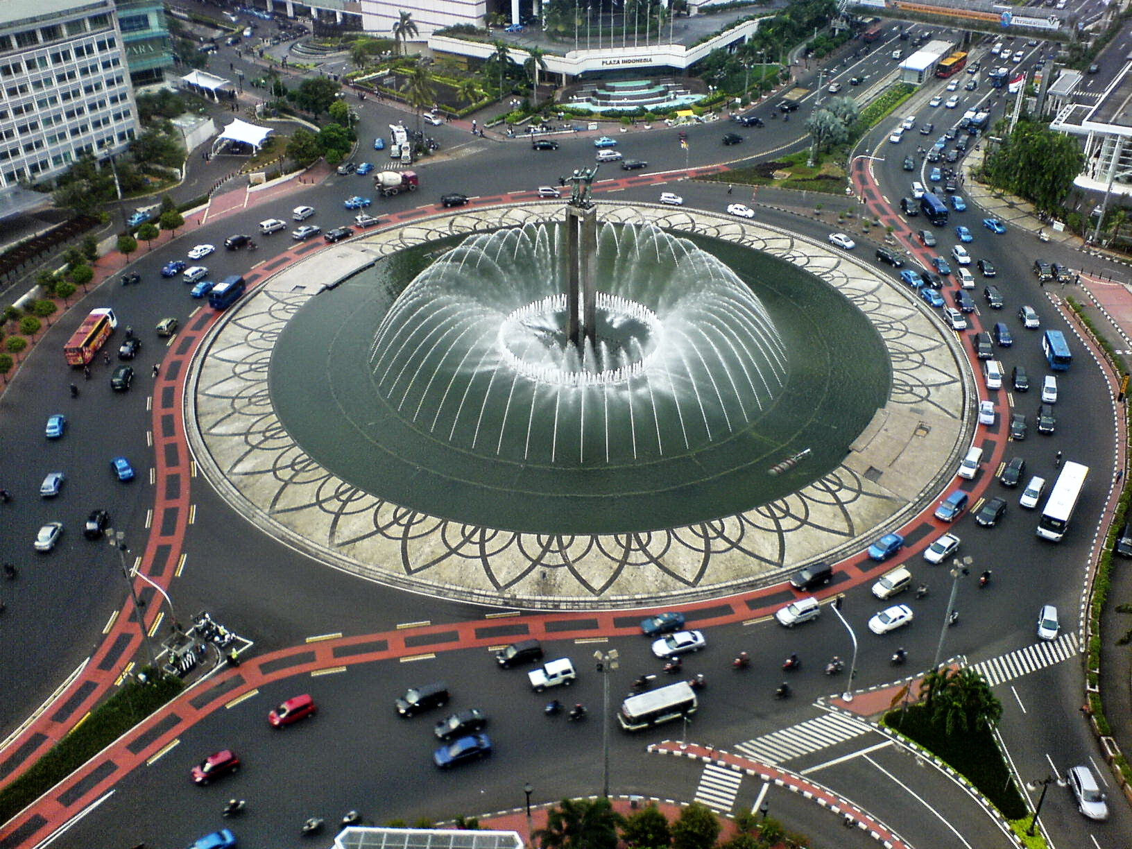 Air mancur Bundaran HI Dan patung selamat datang